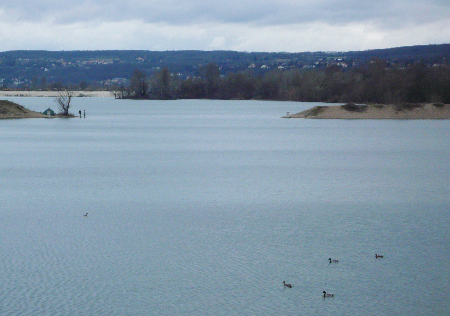 Base de Loisirs du Val de Seine, Verneuil sur Seine